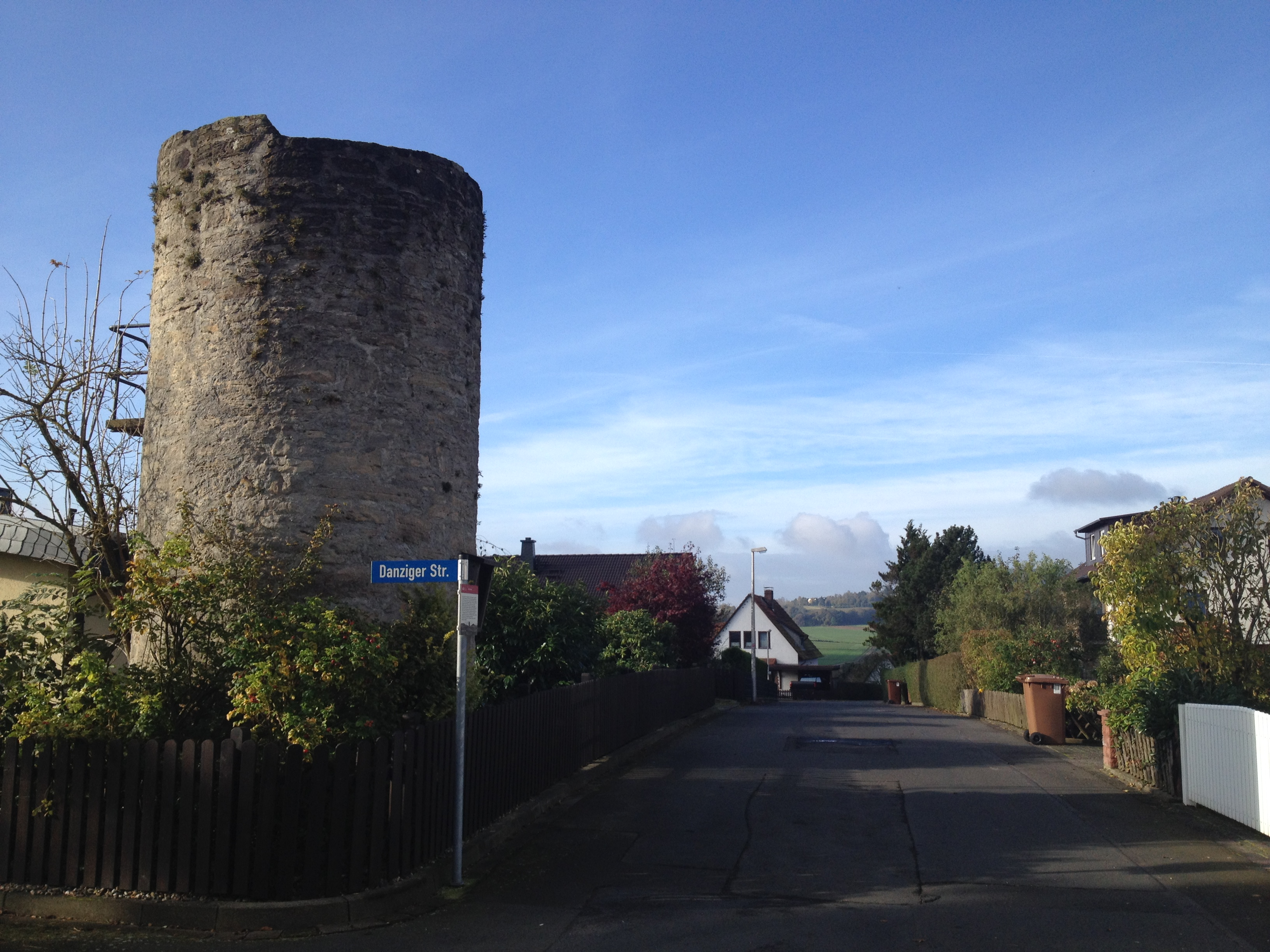 Der Eco Pfad Kulturgeschichte Habichtswald auf der Straße An der Warte. Die Warte steht auf einem Privatgrundstück.